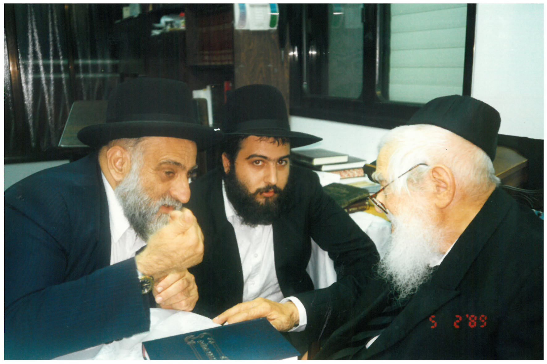 הרב אליעזר מנחם שך, דביר שרם, הרב אליהו שרם